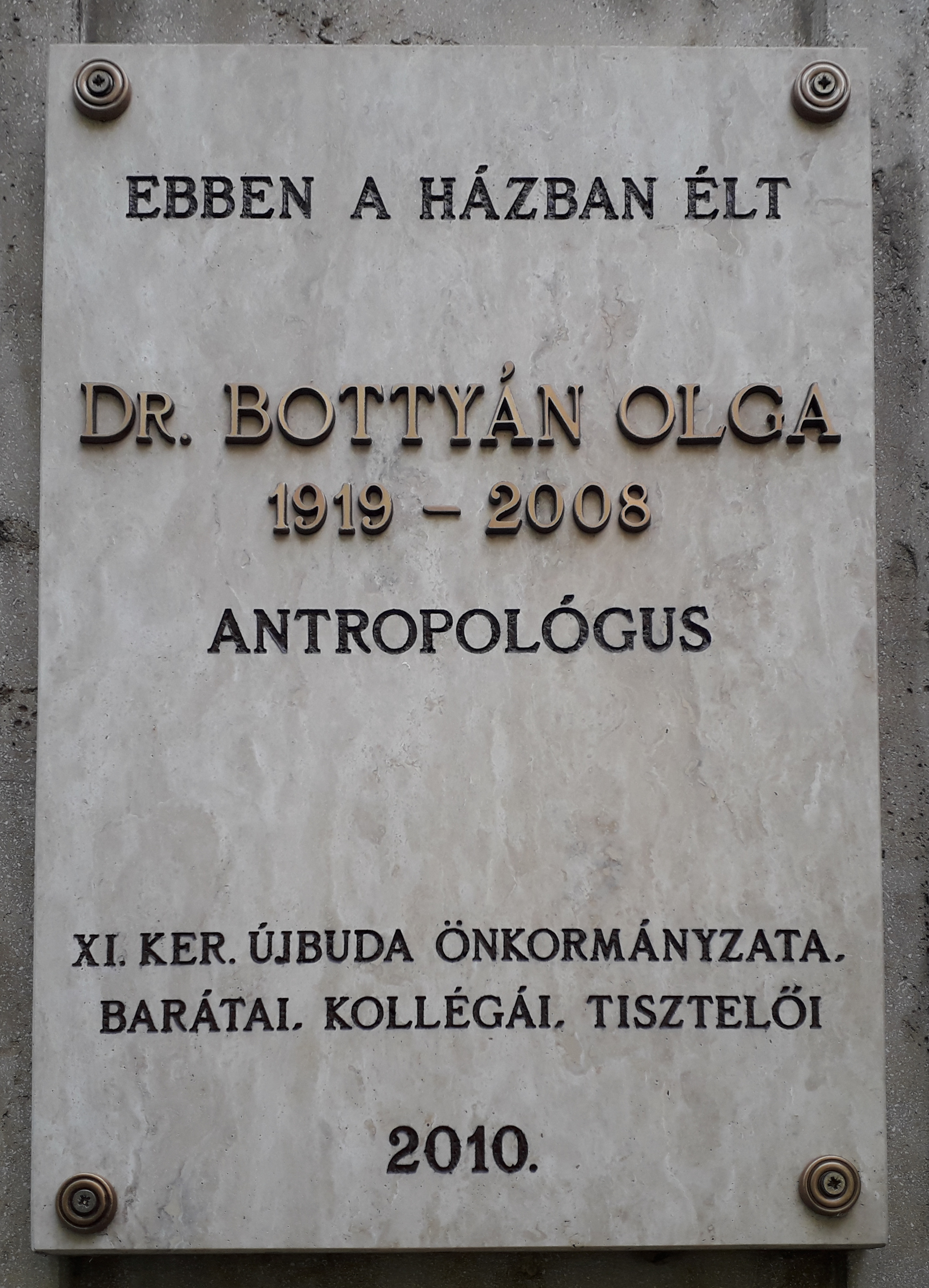 Dr. Bottyán Olga emléktábla 1113 Budapest, Villányi út 24/C